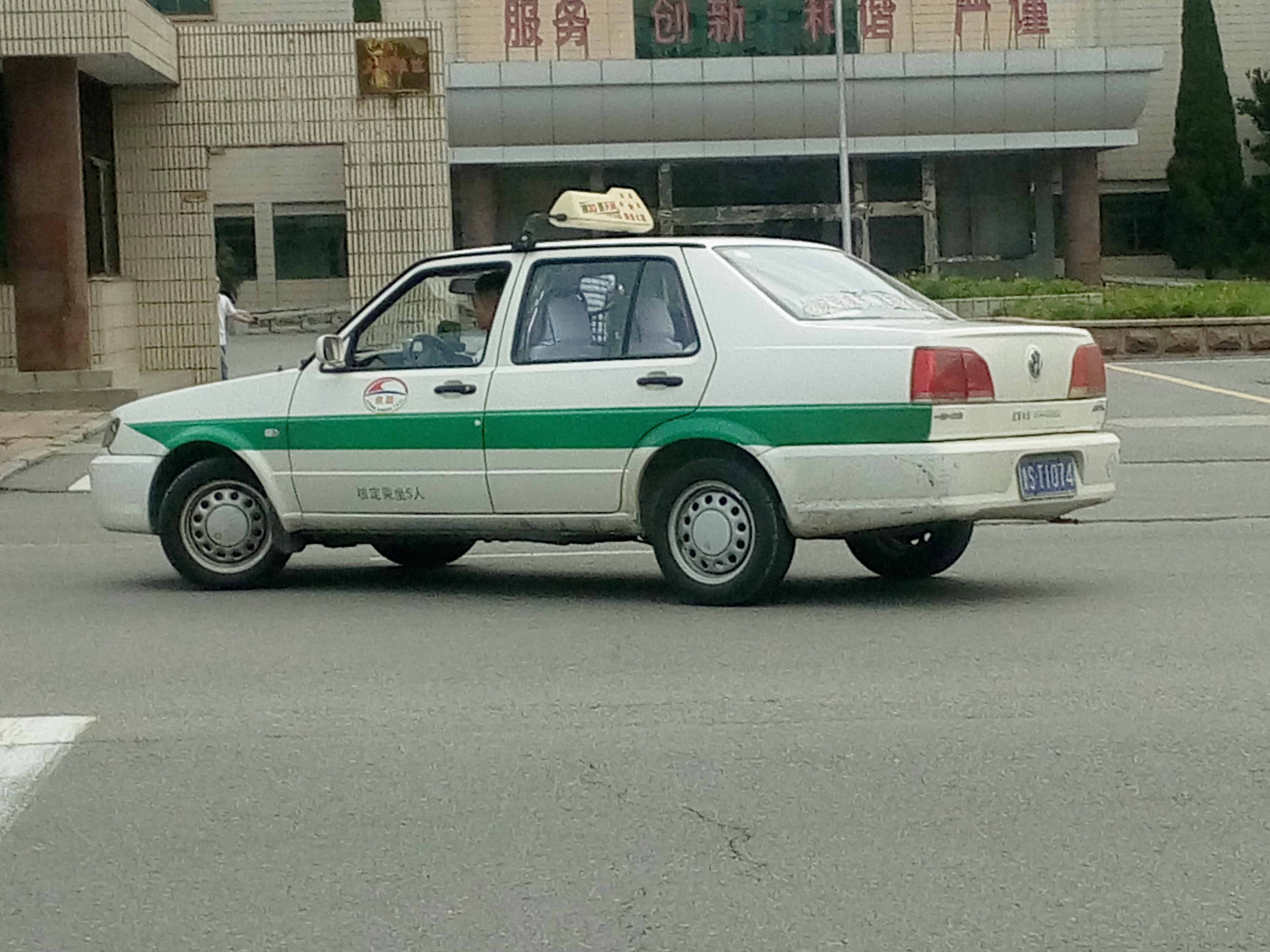 莱芜市出租车配色样式